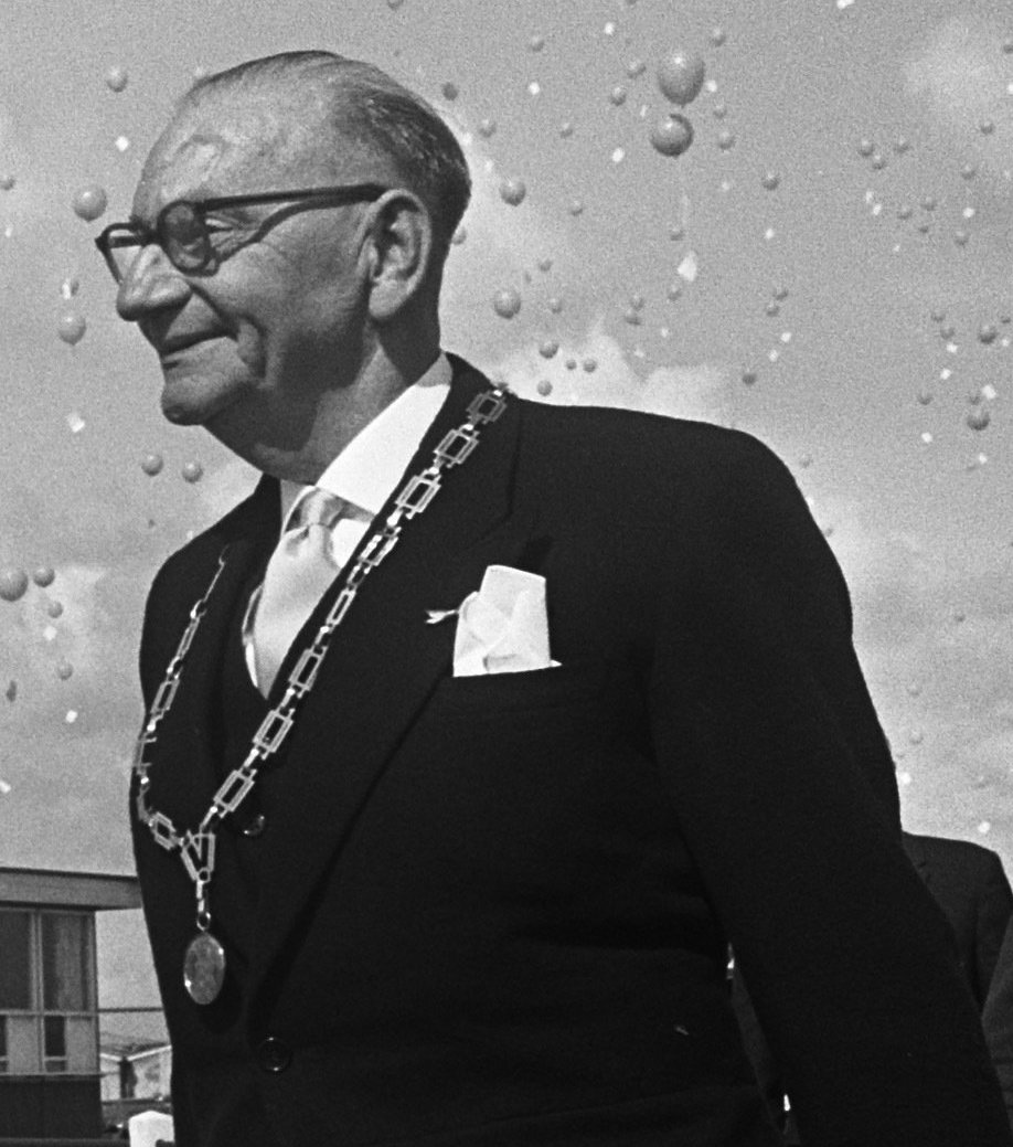 Collectie / Archief : Fotocollectie Anefo Reportage / Serie : [ onbekend ] Beschrijving : koningin Juliana bezoekt Zuid Hollandse gemeenten Datum : 25 mei 1965 Locatie : Zuid-Holland Trefwoorden : GEMEENTEN, bezoeken, koninginnen Persoonsnaam : Juliana (koningin Nederland) Fotograaf : Koch, Eric / Anefo Auteursrechthebbende : Nationaal Archief Materiaalsoort : Negatief (zwart/wit) Nummer archiefinventaris : bekijk toegang 2.24.01.05 Bestanddeelnummer : 917-8099